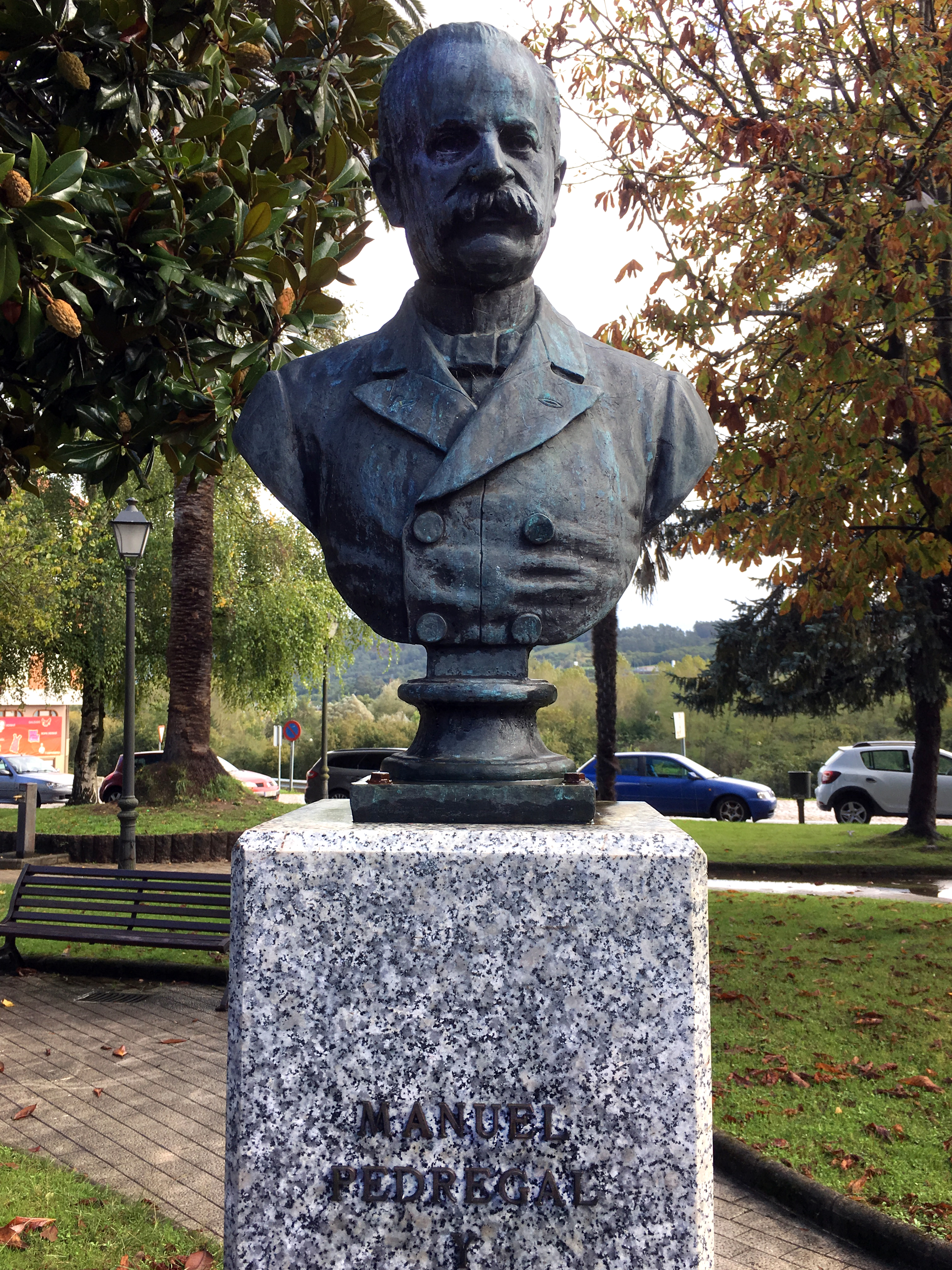 Busto fundido de Manuel Pedregal, en Grado9, Asturias